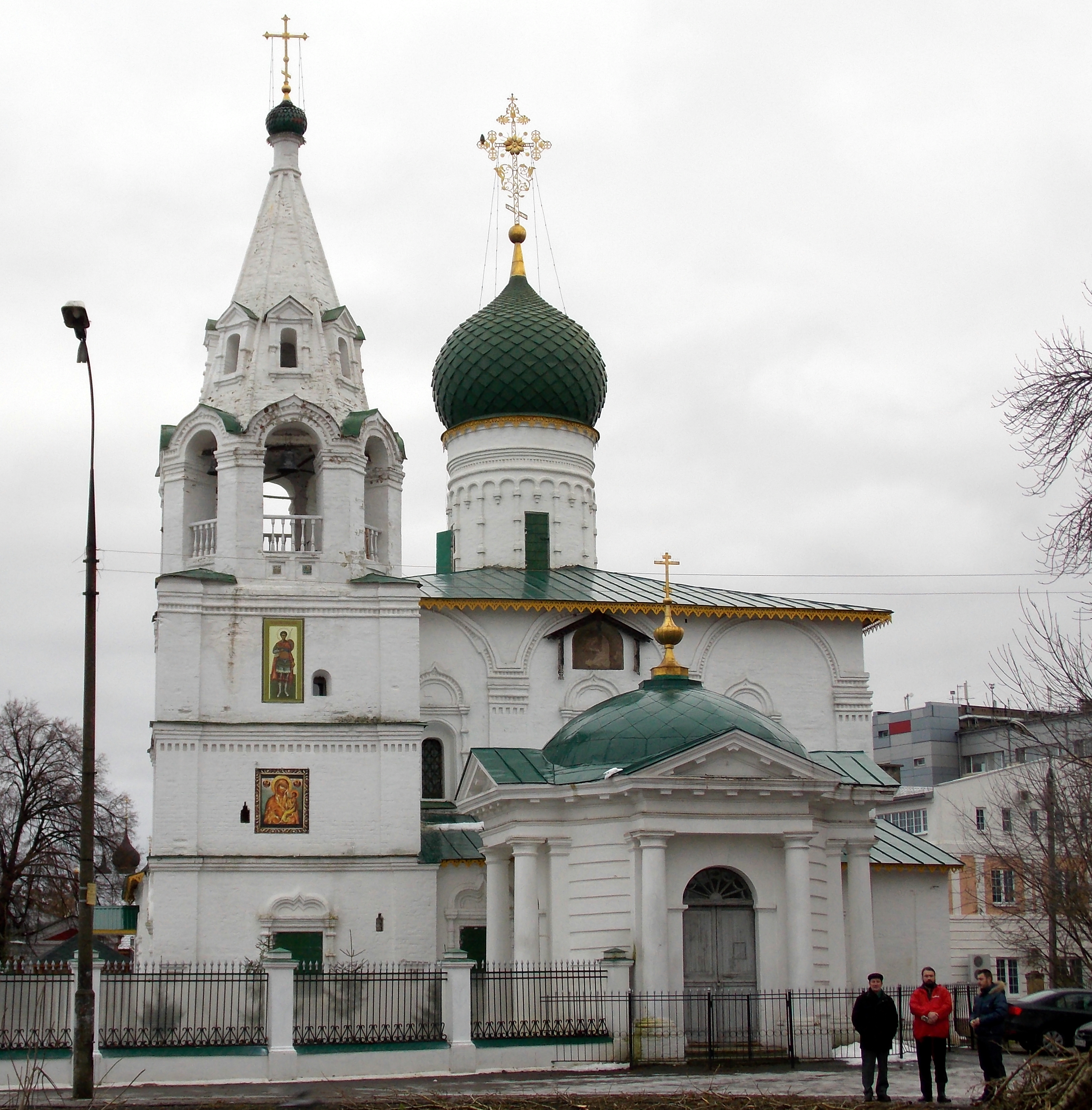 Церковь великомученика Димитрия Солунского (Смоленская): улица Большая Октябрьская, 41а, Ярославль, Ярославская область